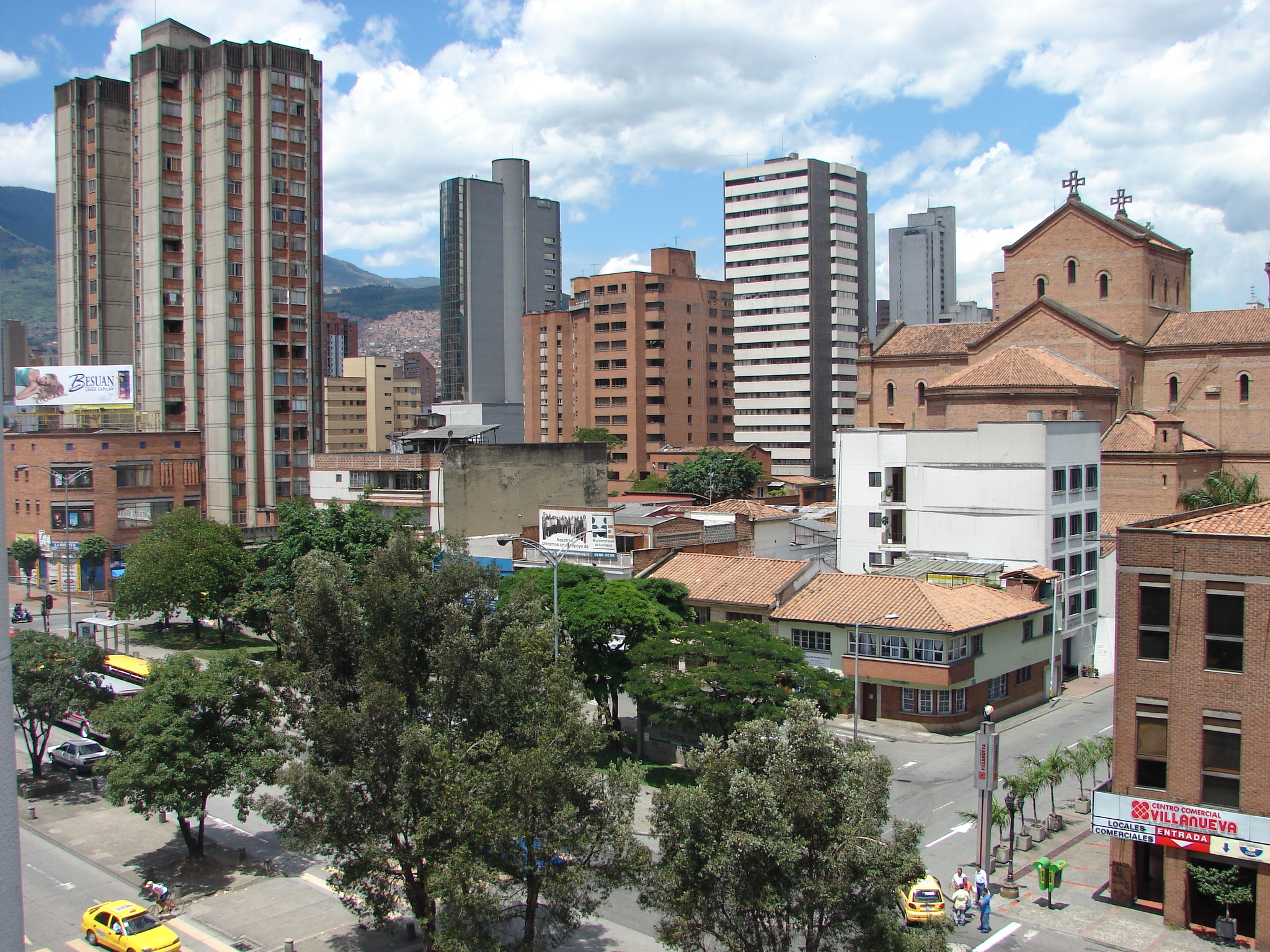 El Centro con la Catedral Metropolitana, Medellín.Colombia